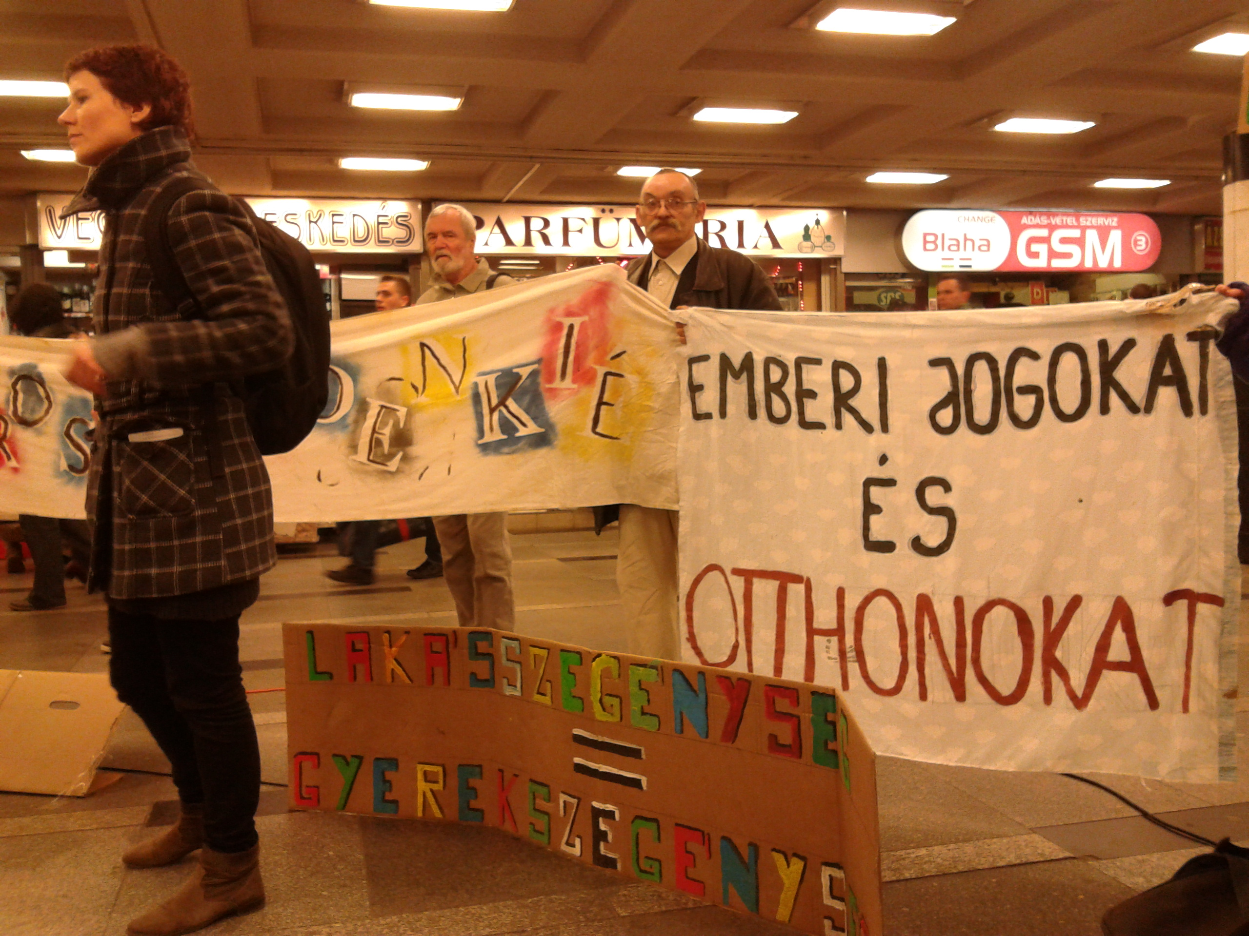 A Város Mindenkié csoport gyerekszegénységi demonstrációja a 2014-es Emberjogi Napon